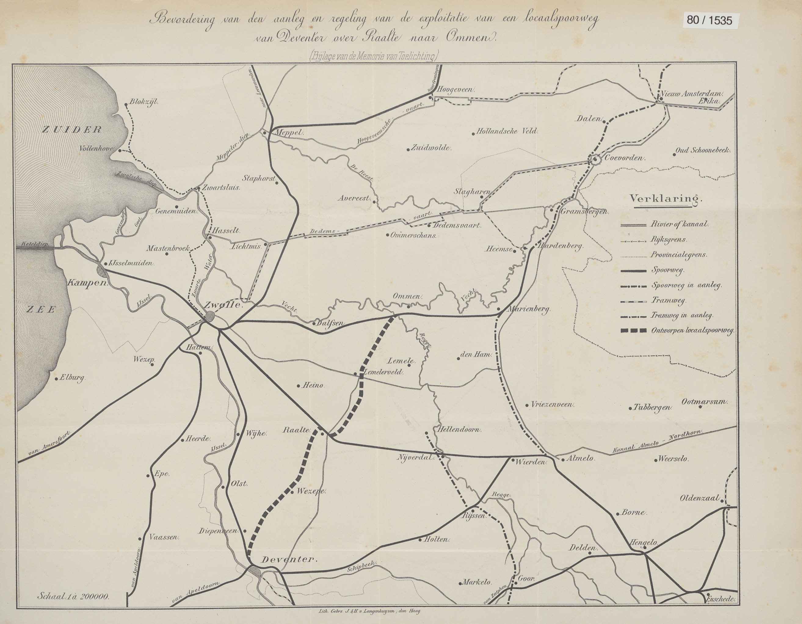 Op de kaart zijn tevens bestaande en in aanleg zijnde spoor- en tramwegen ingetekend